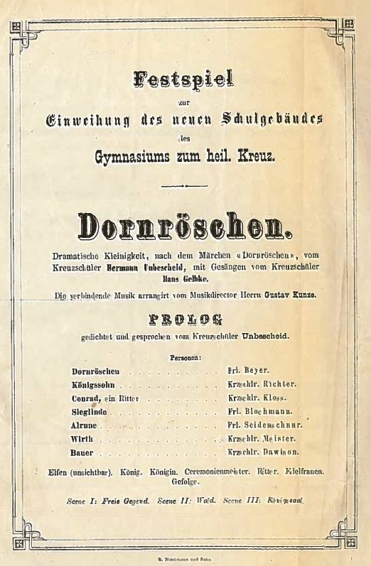 Dornröschen Festspiel zur Einweihung des neuen Schulgebäudes des Gymnasiums zum heil. Kreuz; Dramatische Kleinigkeit